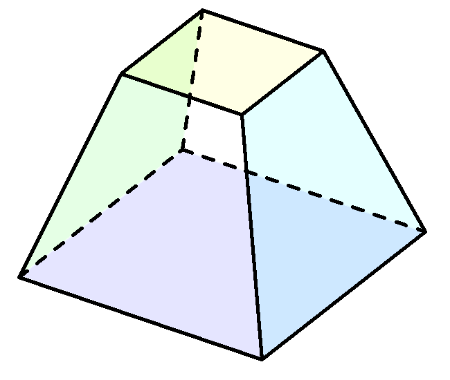 Усечённая квадратная пирамида / Kvadrata trunko